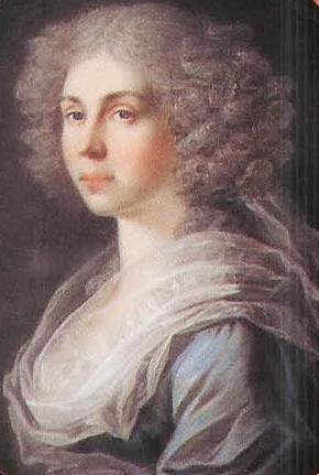 Charlotte von Mecklenburg-Strelitz (1769–1818), Herzogin von Sachsen-Hildburghausen Dukino Charlotte von Sachsen-Hildburghausen (Ŝarlot' fon Saĥsen-Hildburghaŭzen) (1769-1818)